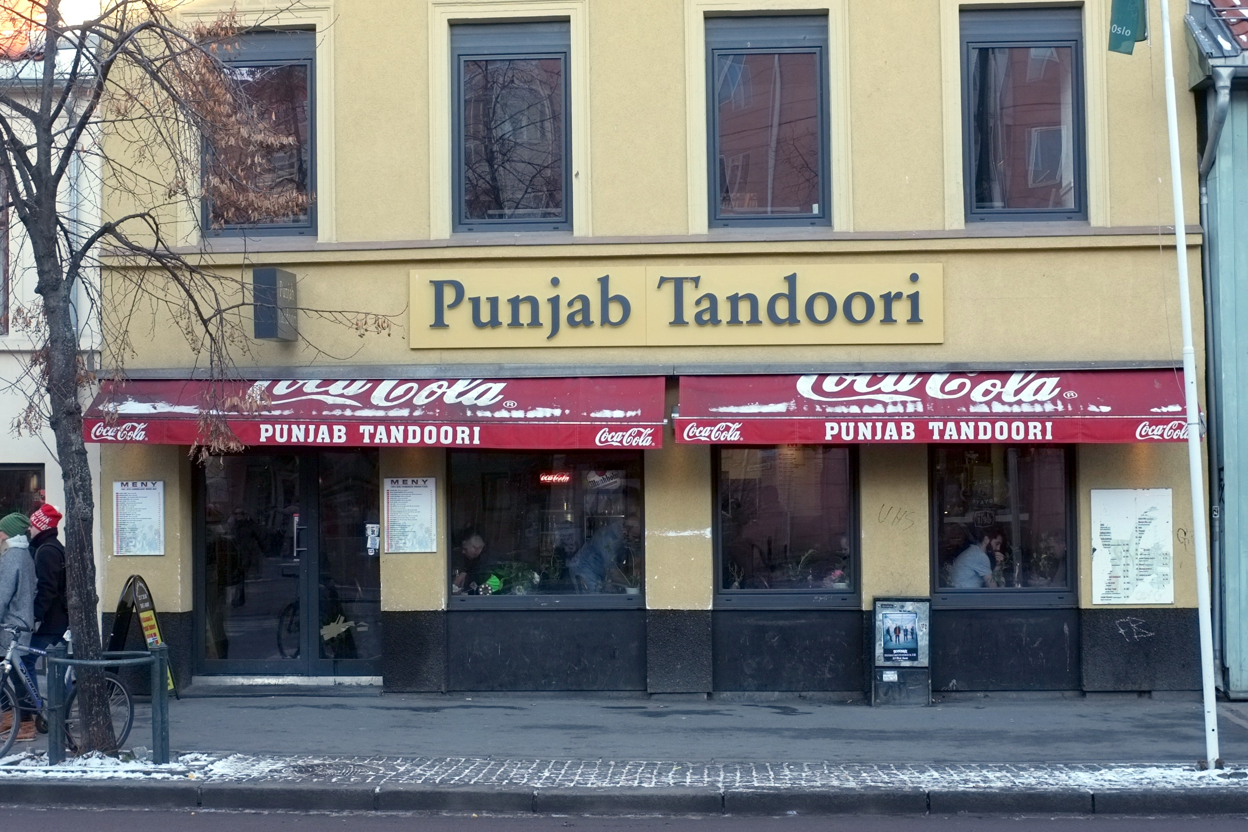 Punjab Tandoori. Grønland i Oslo.